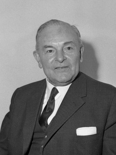 Hans Ehard (Porträt, sitzend). Zuschnitt von File:Bundesarchiv B 145 Bild-F011950-0010, Hans Ehard.jpg